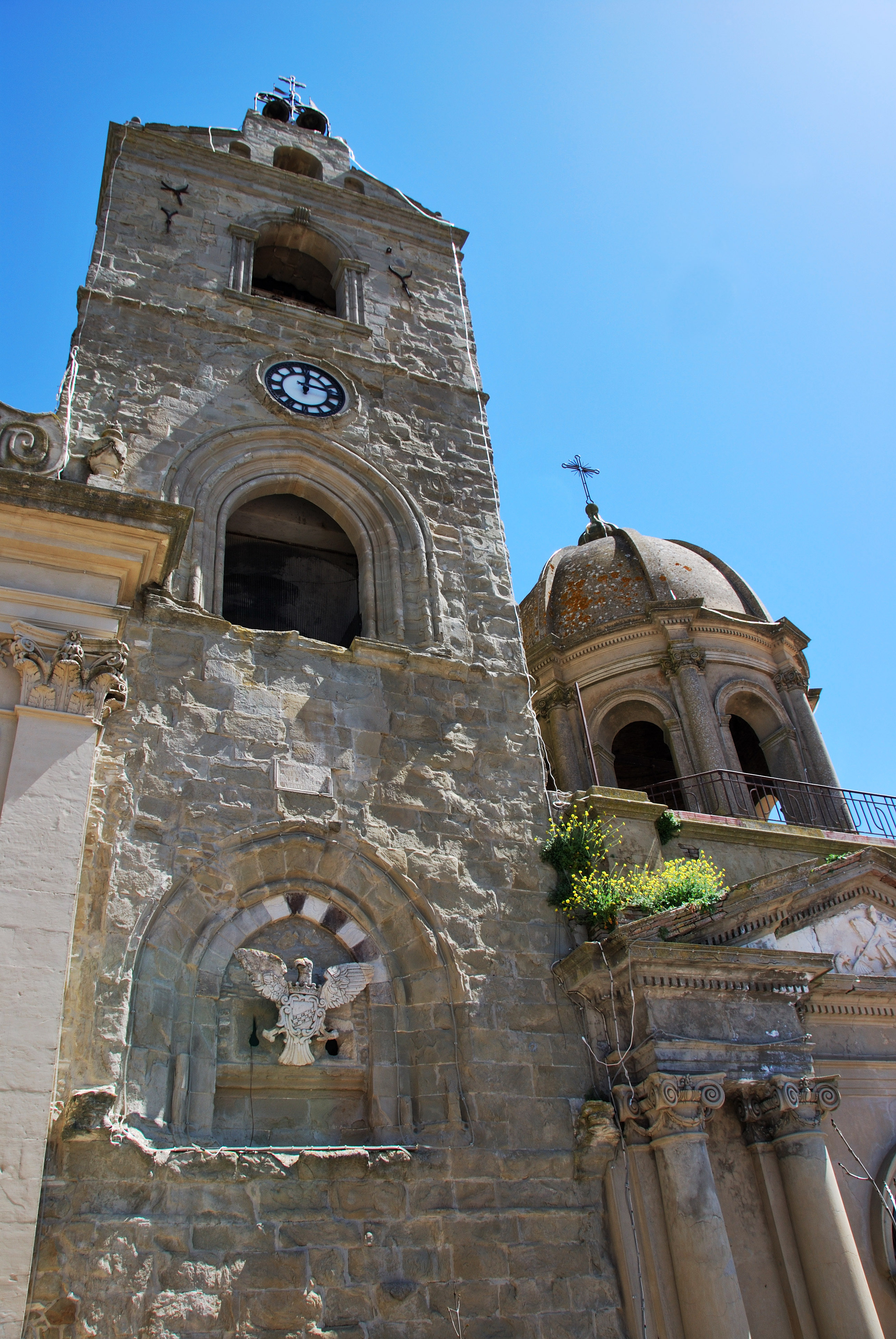 Torre Aragonese